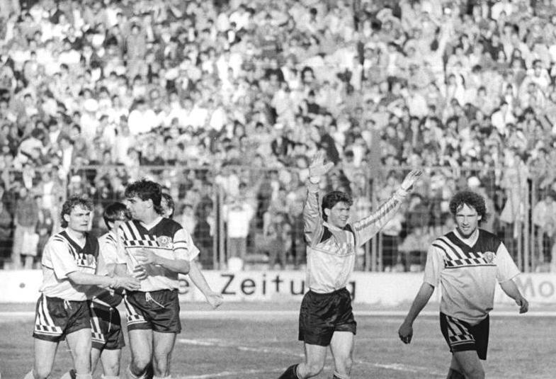 ADN-ZB-Sindermann- -10-5-89-ba-Rostock: Fußball-Oberliga- 23. Spieltag- FC Hansa Rostock - SG Dynamo Dresden 2:2- Die Punkteteilung im ausverkauften Ostsee-Stadion sicherte den Elbstädtern drei Spieltage vor dem Saison-Ausklang nach elf Jahren wieder den Meistertitel. Nach Spielende freuen sich Ralf Hauptmann, Ralf Minge, Ronny Teuber und Andreas Trautmann (v.l.).